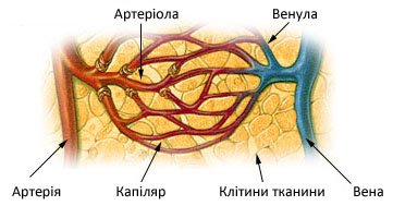 Судини мікроциркуляторного русла